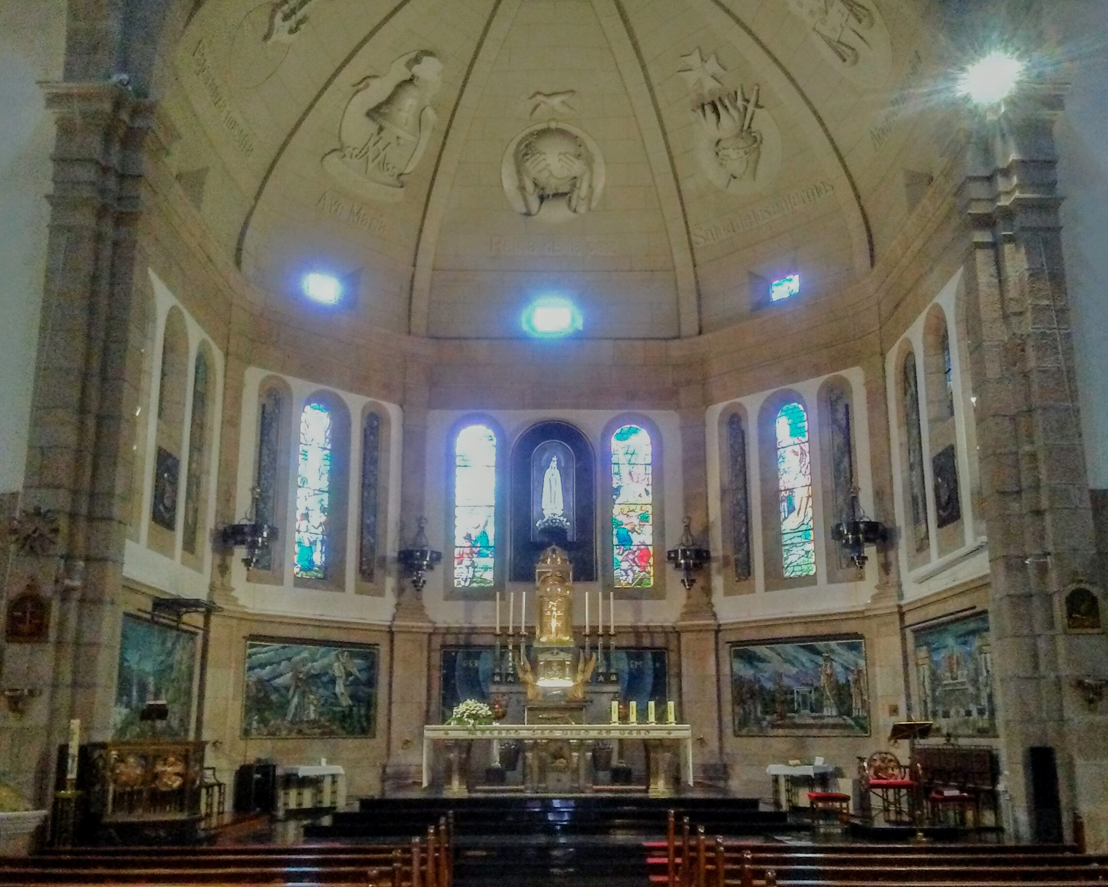 Iglesia de Fátima, Ourense.